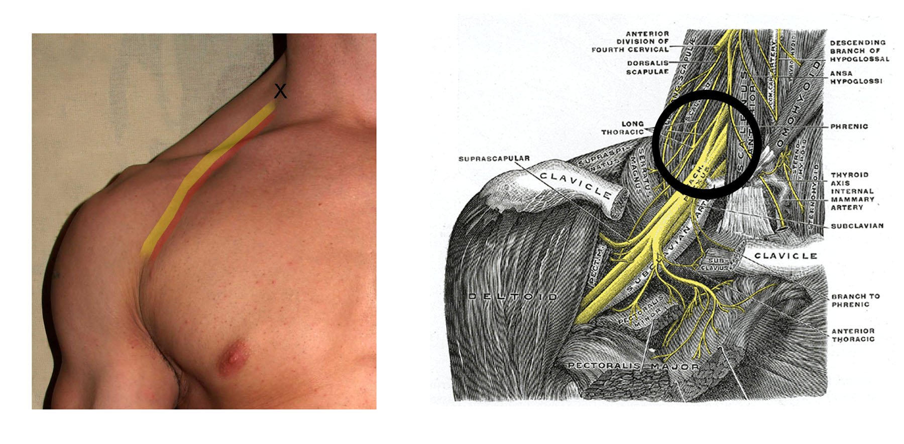 Links: Punktionsort des interskalenären Blocks. Rechts: Verlauf von Arterie und Nerven, Ort der Ausschaltung.